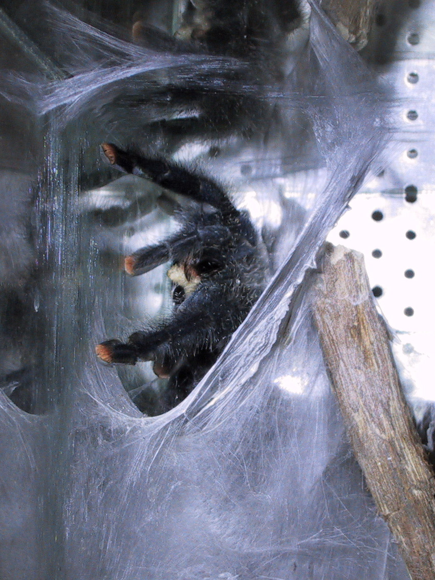 Description: Mygale. Photo d'une avicularia metallica dans sa toile Source: Cécile Sprimont 2002 Licence